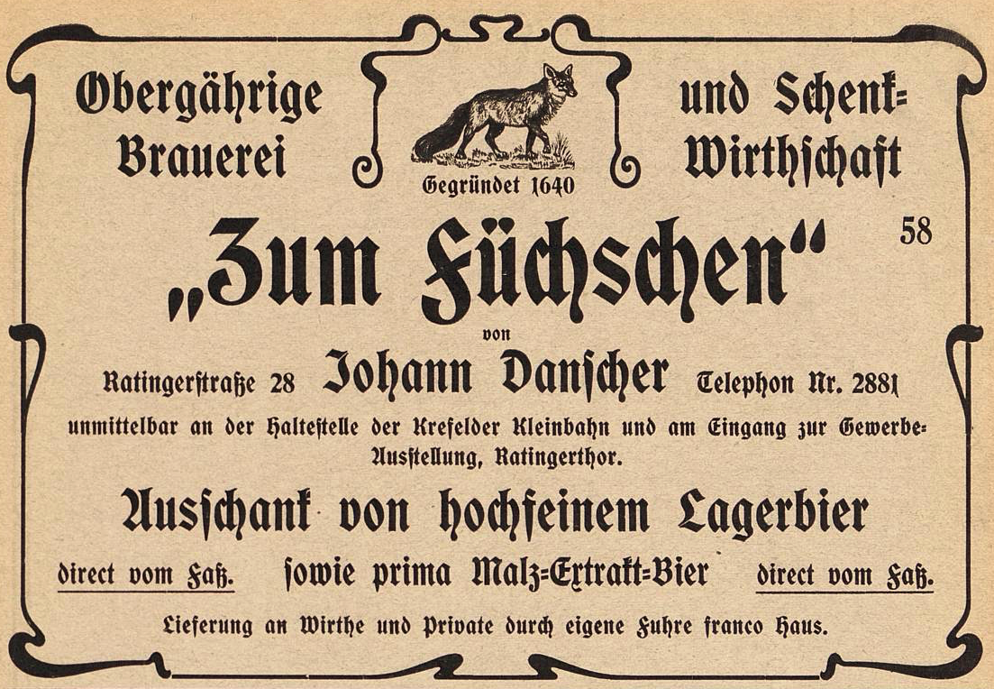 "Zum Füchschen", Obergährige Brauerei und Schenkwirtschaft, Johann Danscher, Ratingerstraße 28, Anzeige in Adressbuch Düsseldorf 1902